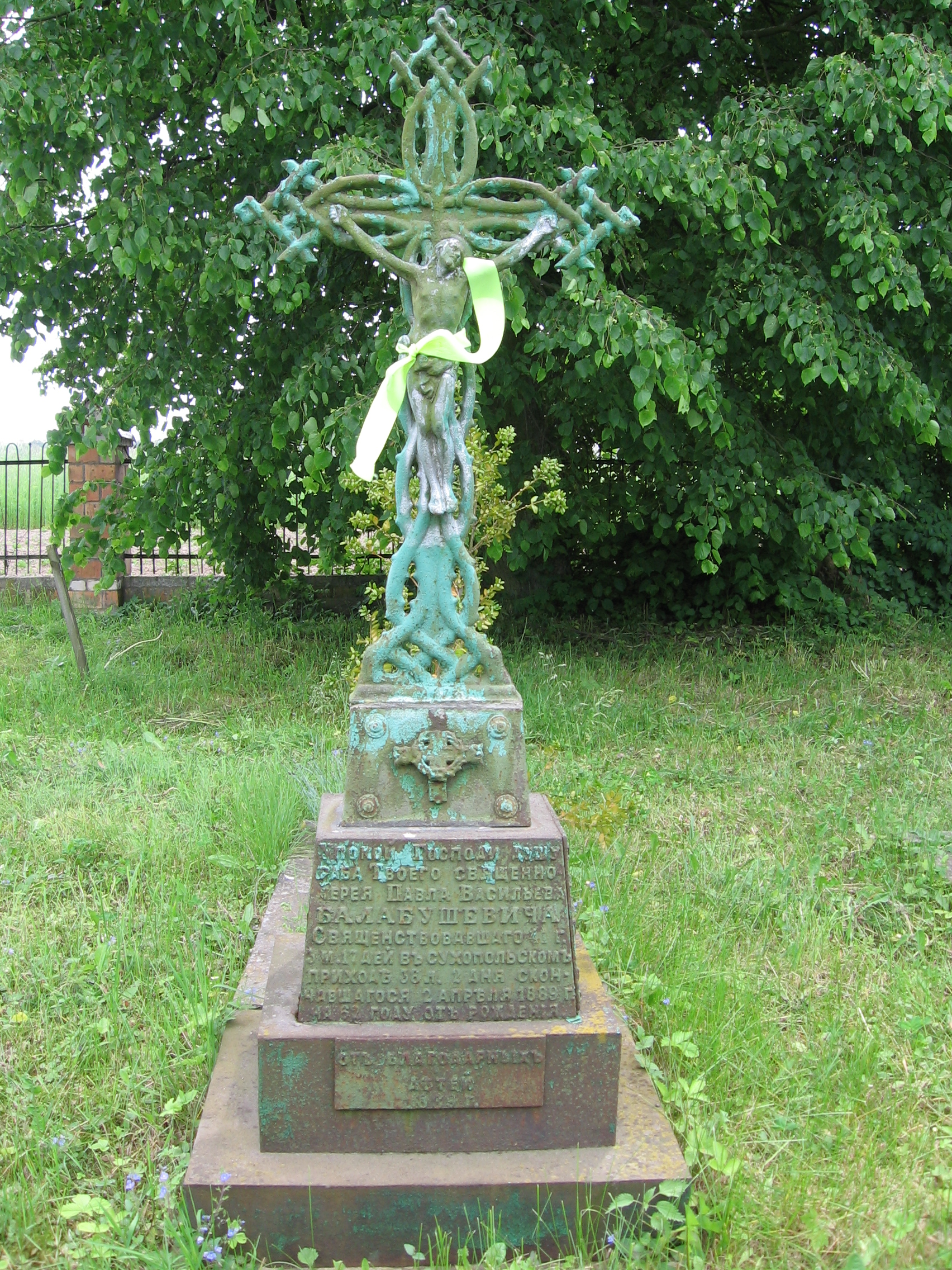 Беларуская (тарашкевіца): Царква ўзьвіжаньня Сьвятога Крыжа (Сухопаль). Надмагілле іерэя Паўла Балабушэвіча. This is a photo of Belarusian heritage monument. Reference number: 113Г000652 ( WLM)